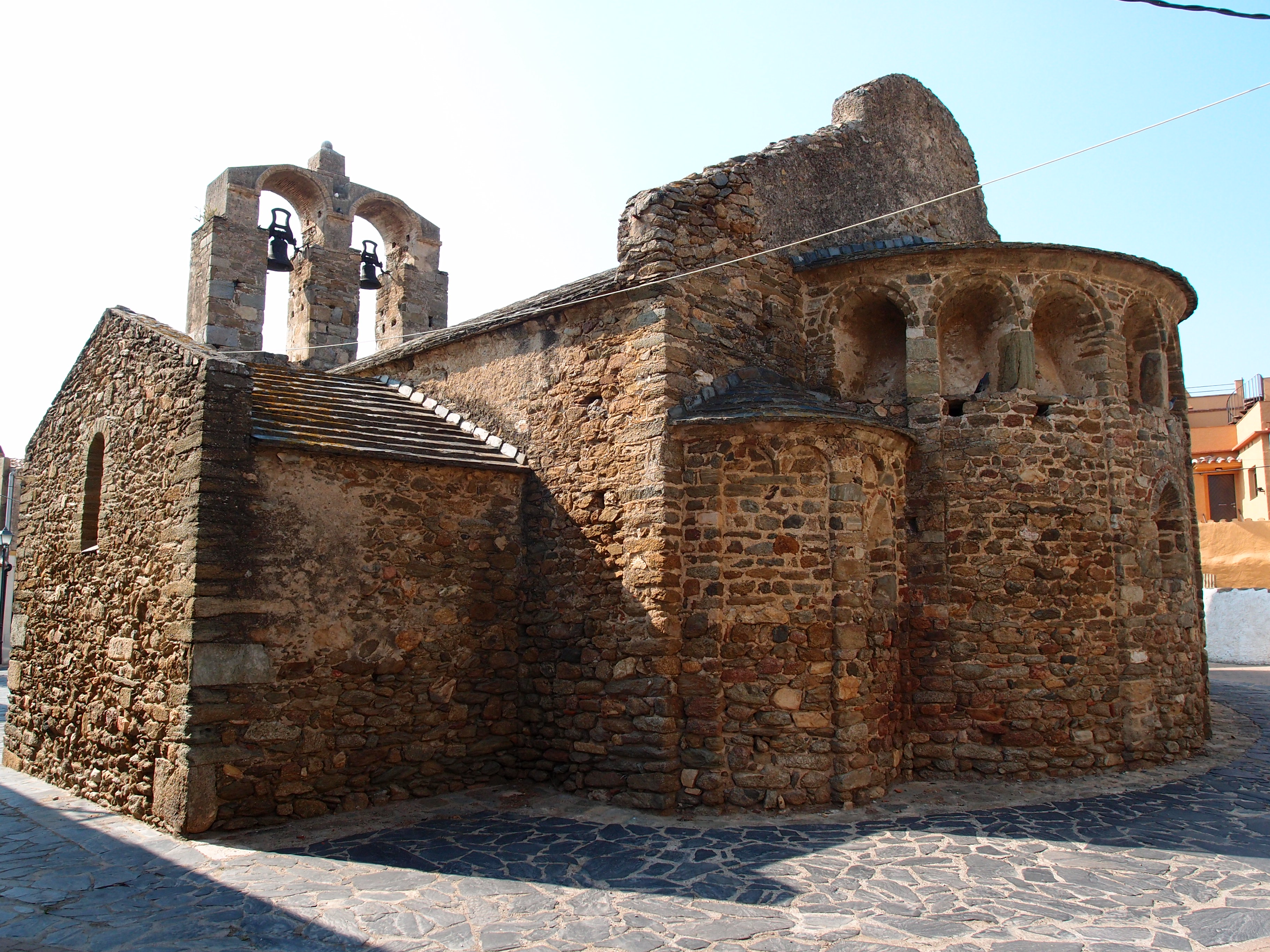 Die Església de Sant Joan in Palau-savedera Datum: 06.09.2012 Urheber: M. Pfeiffer alias Benutzer:Gordito1869 Quelle: privates Fotoarchiv des Urhebers